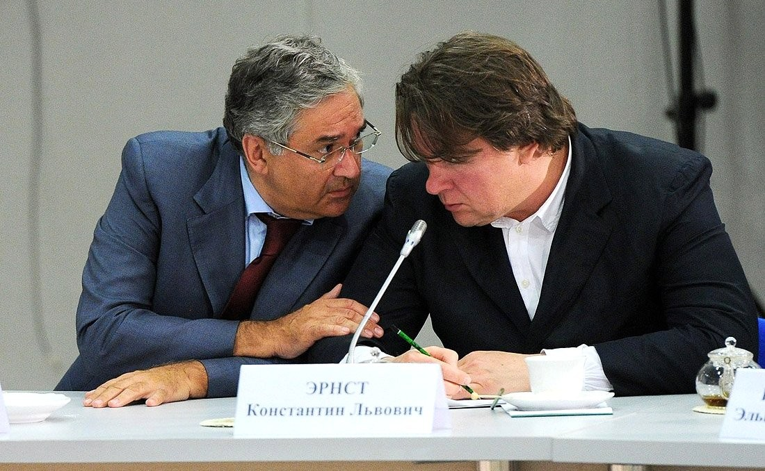 Генеральный директор ВГТРК Олег Добродеев и генральный директор Первого канала Константин Эрнст на совещании по вопросам развития отечественной кинематграфии